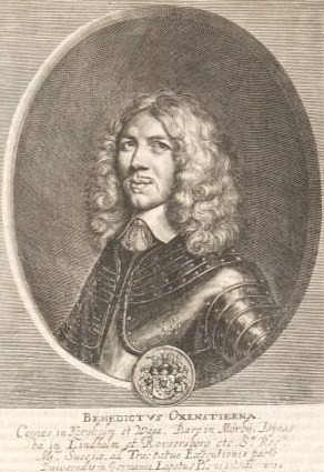 Benedikt (Bengt) Graf Oxenstierna (geb. 1623; gest. 1702), Schwedischer Kriegsrat, Beauftragter der schwedischen Königin in Nürnberg zum Friedensexekutionsrezeß